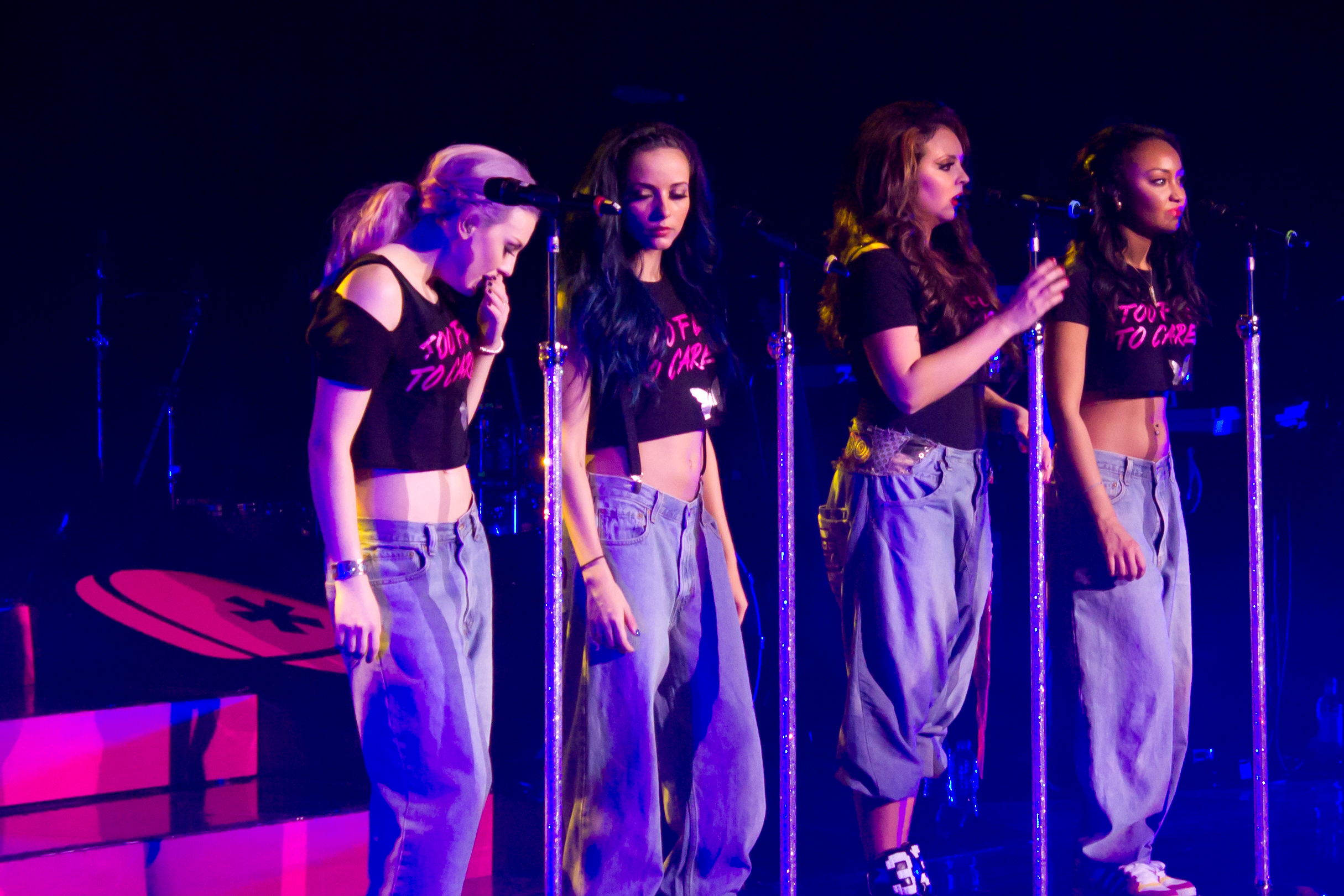 File:Little-mix-1.jpg Little Mix en el photoshoot de su segundo album denominado 'Salute'. De izquierda a derecha: Perrie, Leigh-Anne, Jesy y Jade.